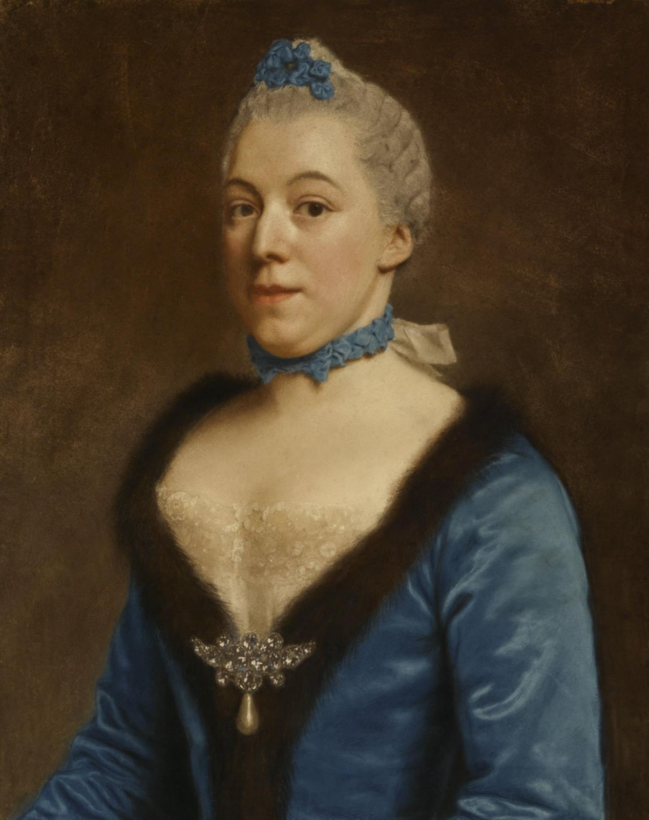 Clara Magdalena Dedel (1727-1778), echtgenote van Hendrick Bicker, was de dochter van Jan Hudde Dedel, burgemeester van Den Haag en van Magdalena Antonia Muyssart.